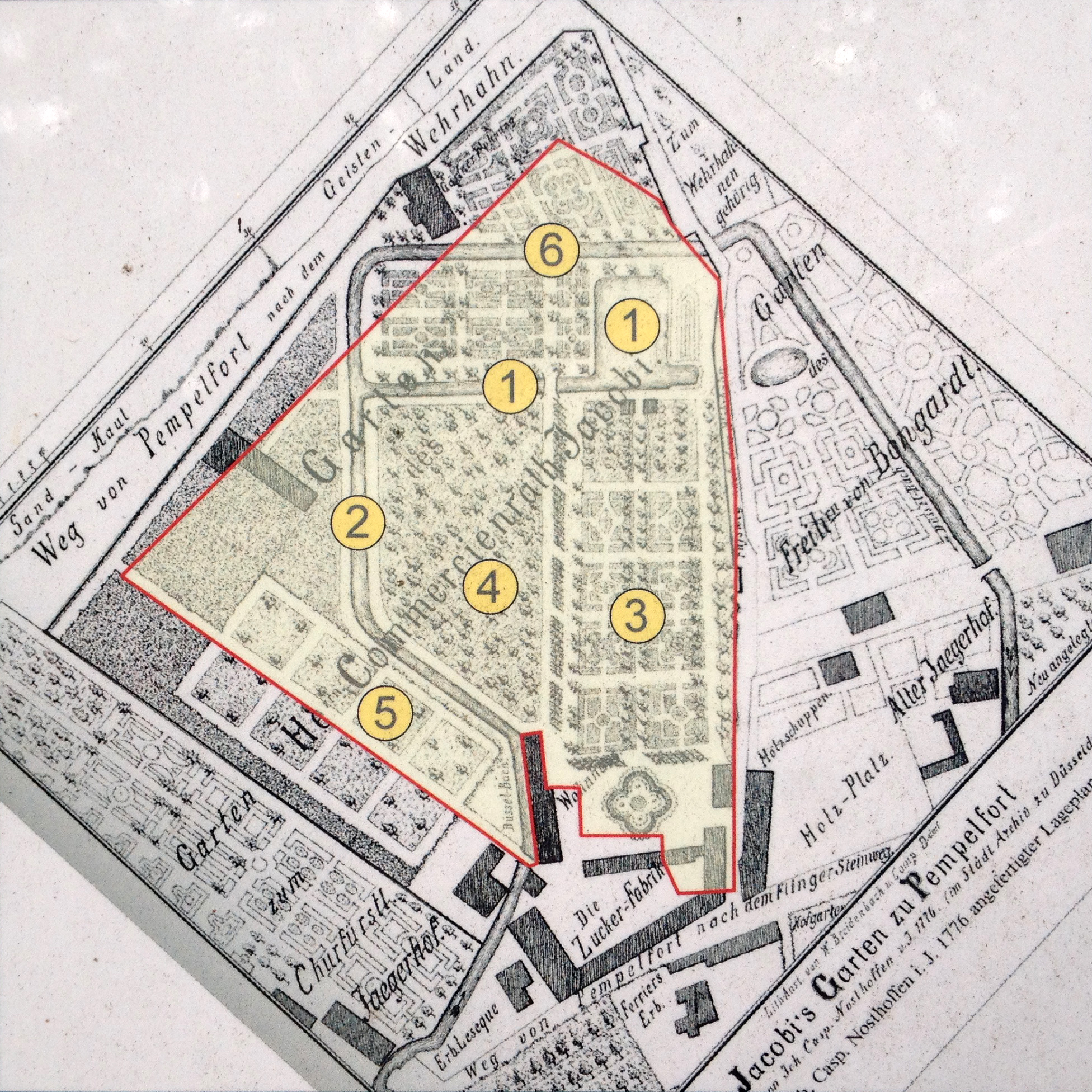 Jacobigarten Karte A, um 1776 (Nosthoffen)